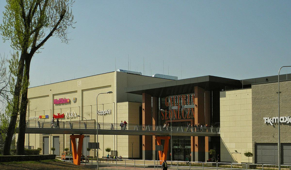 Kładka łącząca galerię z placem Jagiellońskim.